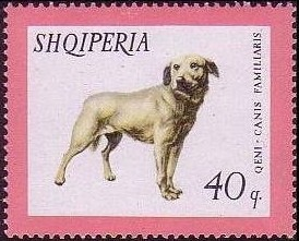 Истрийский бракк